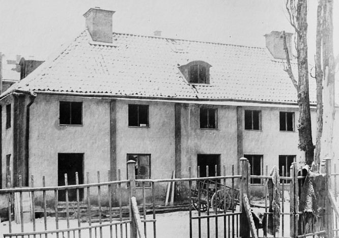 Mäster Anders, restaurang från 1692, riven på 1890-talet. Låg på Kungsholmsgatan 6 (nuv. 16).